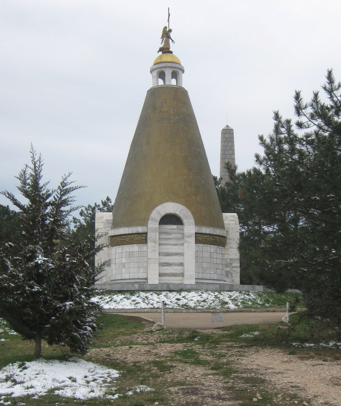 Меморіальний комплекс «Сапун-гора», Севастополь, Сапун-гора